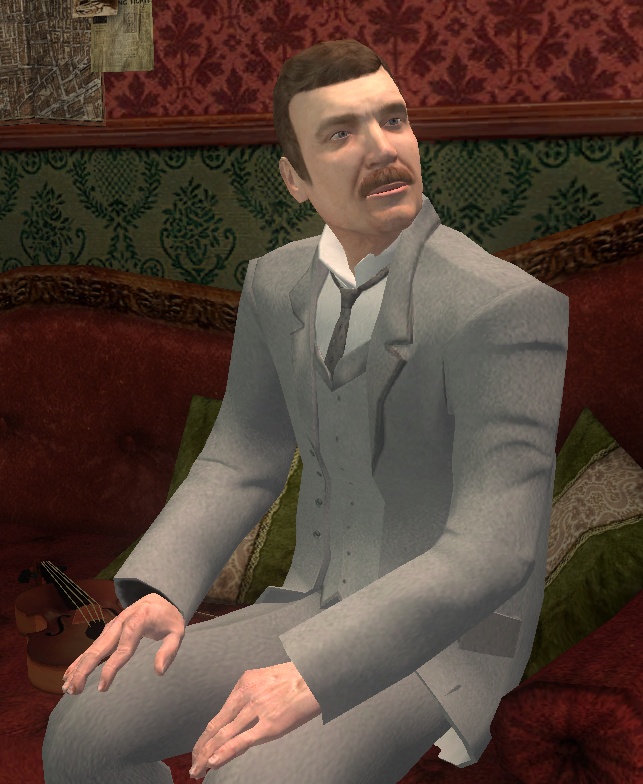 Capture d'écran du jeu Sherlock Holmes contre Jack l'Éventreur. Watson est ici assis sur le divan du 221B, Baker Street. Le violon de Holmes est à-côté de lui.